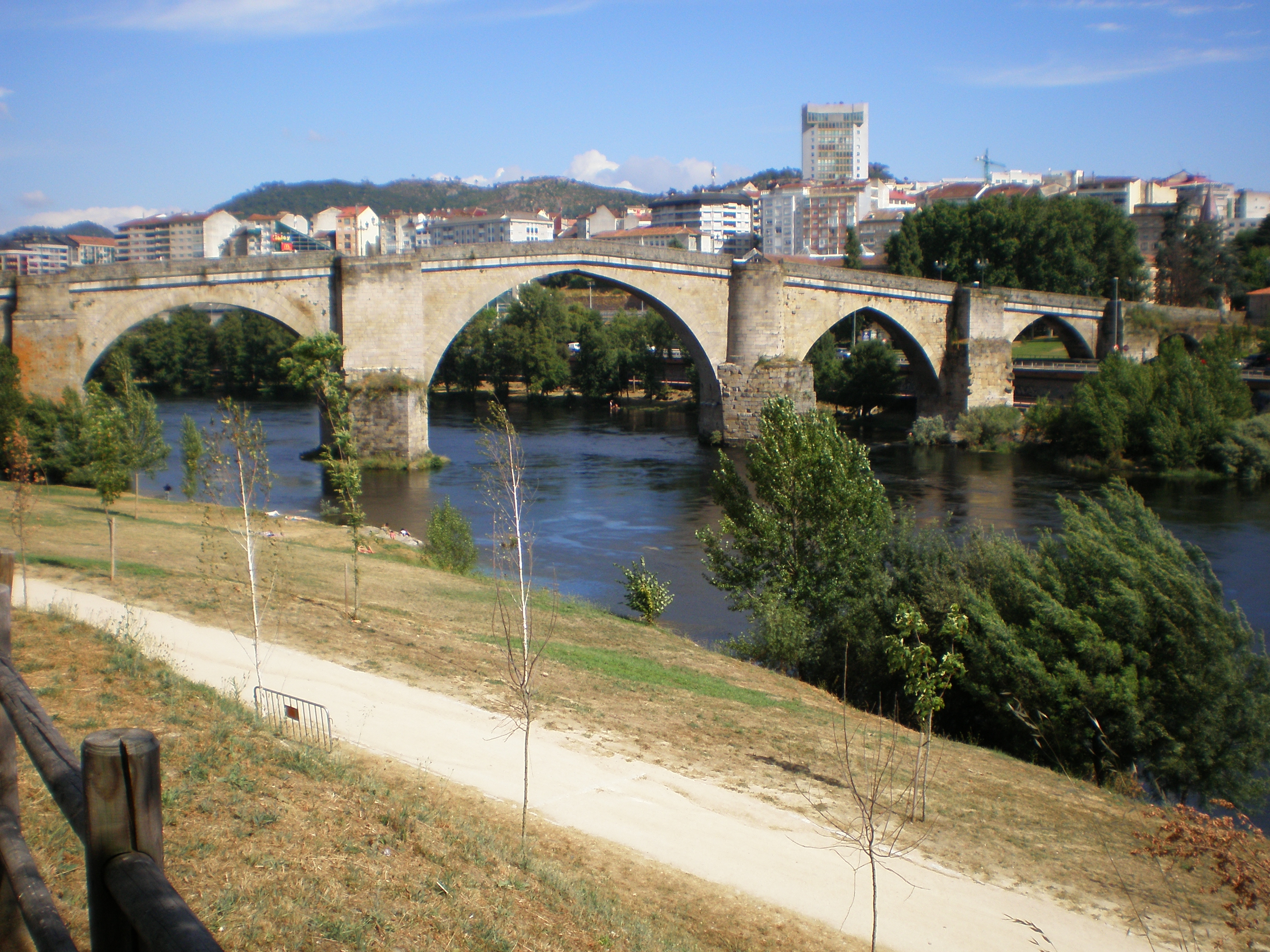 Pont romá de Ourense